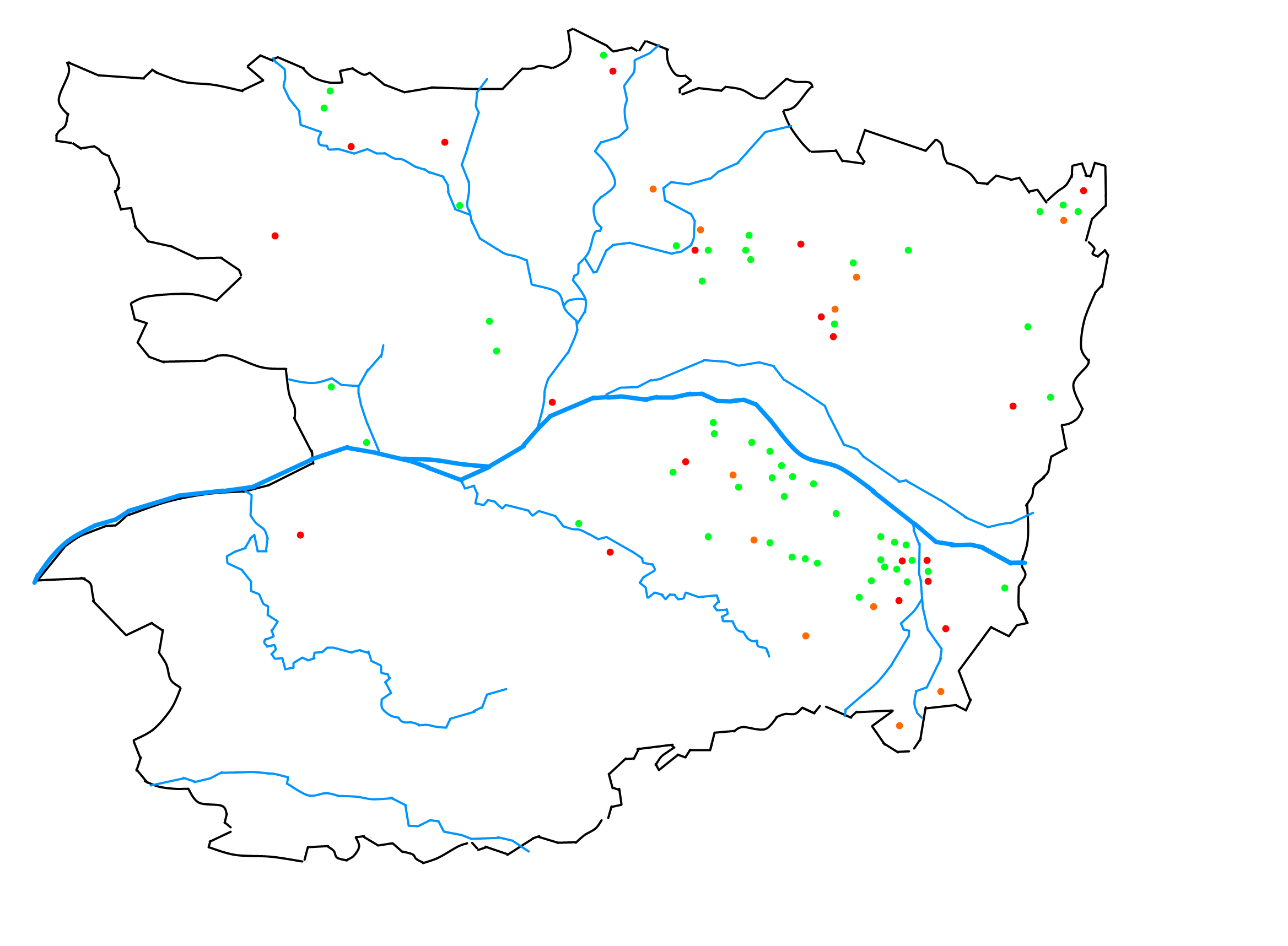 Carte de répartition des dolmens en Maine-et-Loire. Vert: dolmen existants Orange: dolmen ruiné Rouge: dolmen détruit